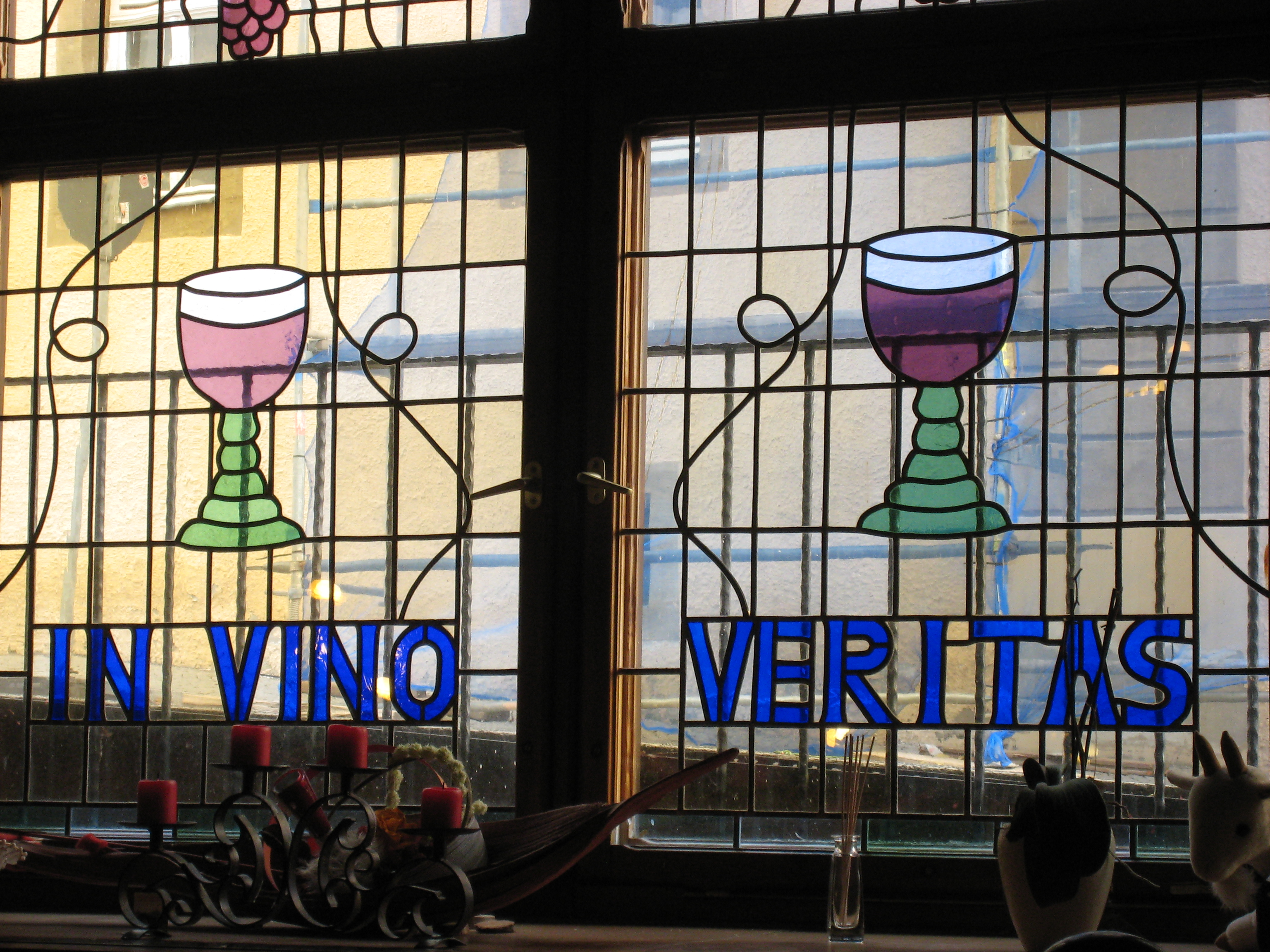 Vitraloj kun la enskribo "In vino veritas" en la gastejo Ratskeller en Ilmenau, Germanio